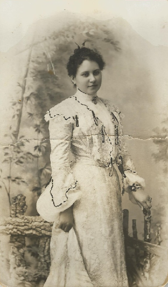 Persay Ferenc Bars megyei alispán felesége, Rakovszky Margit Brigitta Mária (1874–1953), Aranyosmarót